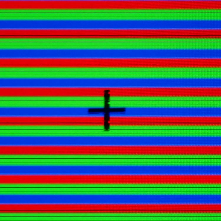 Kurzbelichtung (1/16000 Sekunde pro Zeile) der Projektion einer weißen Fläche mit einem schwarzen Kreuz mit einem DLP-Gerät mit Rolling-Shutter-Effekt. Zu einem Zeitpunkt, also innerhalb einer Zeile, wird immer nur eine der drei Primärfarben projiziert.